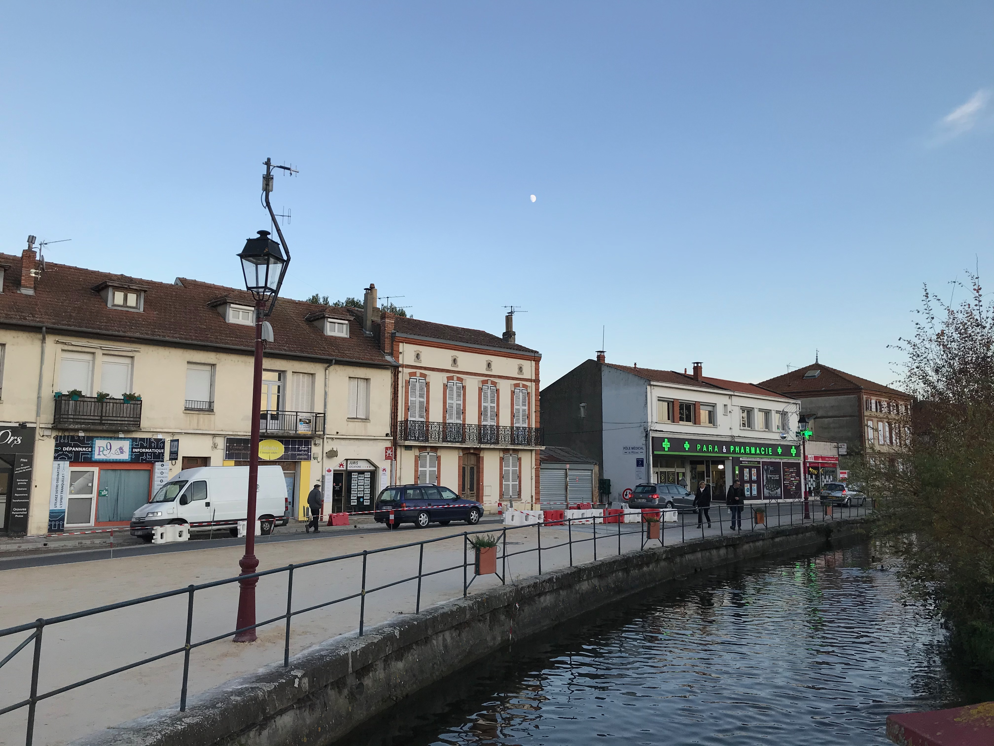 Le canal le long du boulevard Alsace Lorraine à Pamiers